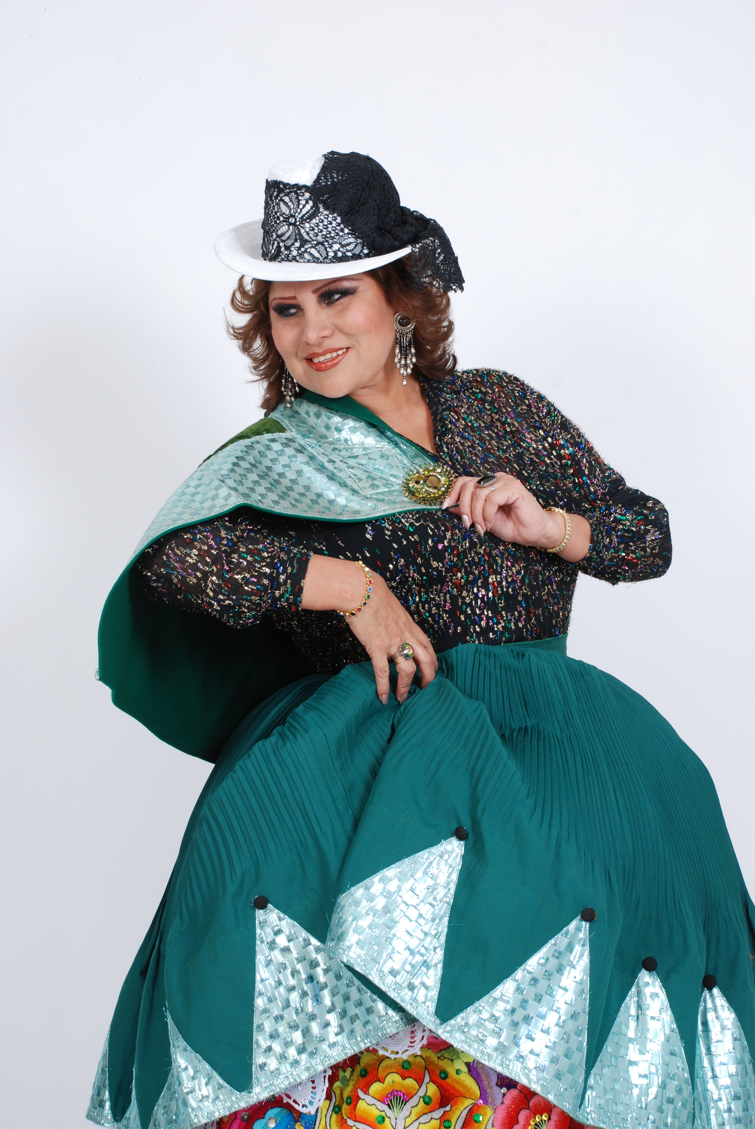 tomada en fotos roma